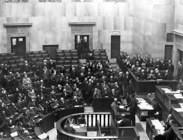 Nocne posiedzenie Sejmu w 26/27 stycznia 1931 roku, na którym poruszano sprawę Brześcia. Ogólny widok sali posiedzeń podczas przemówienia posła Stanisława Duboisa